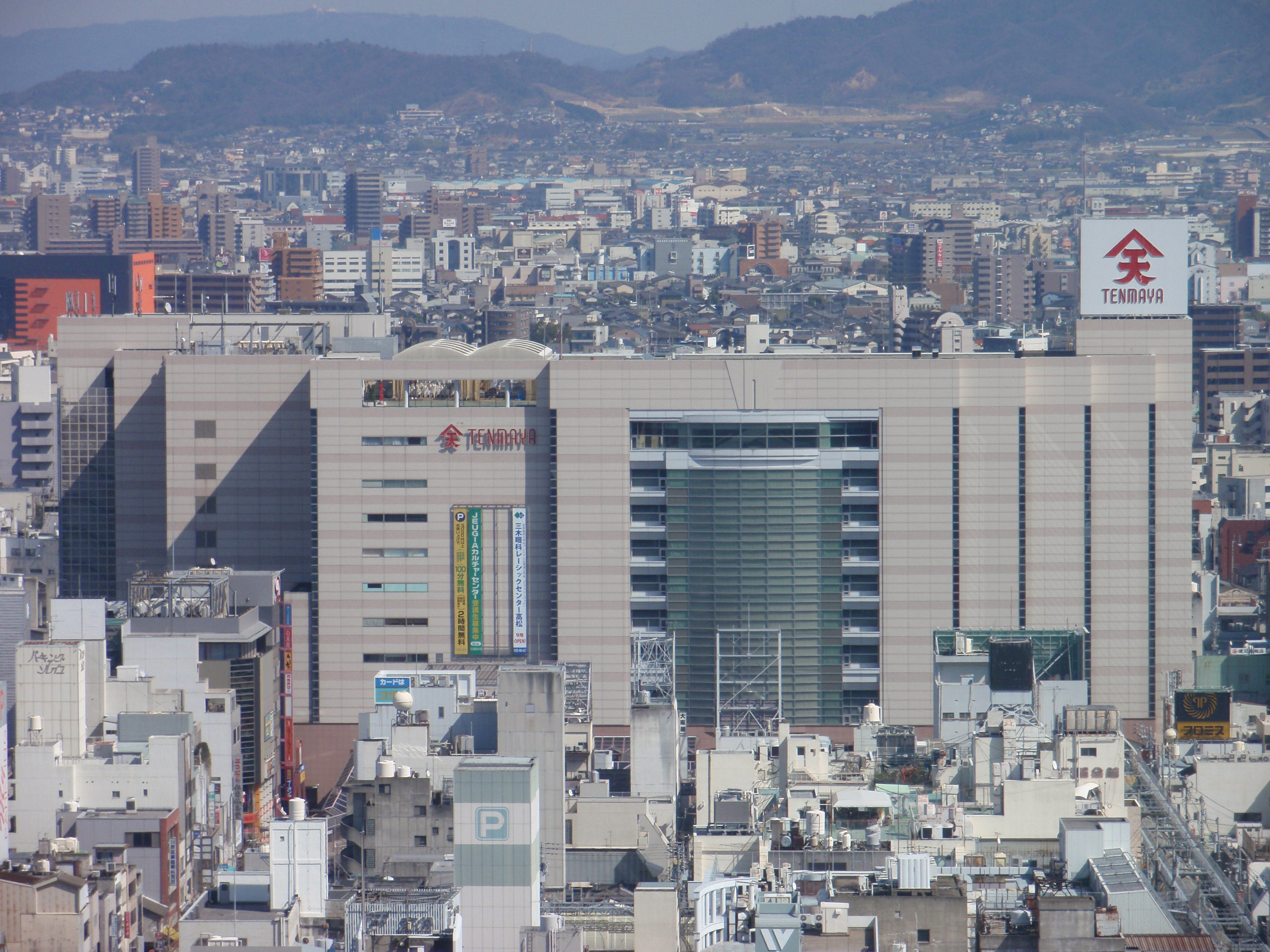 香川県高松市常磐町の琴電瓦町ビル。香川県庁展望台から。